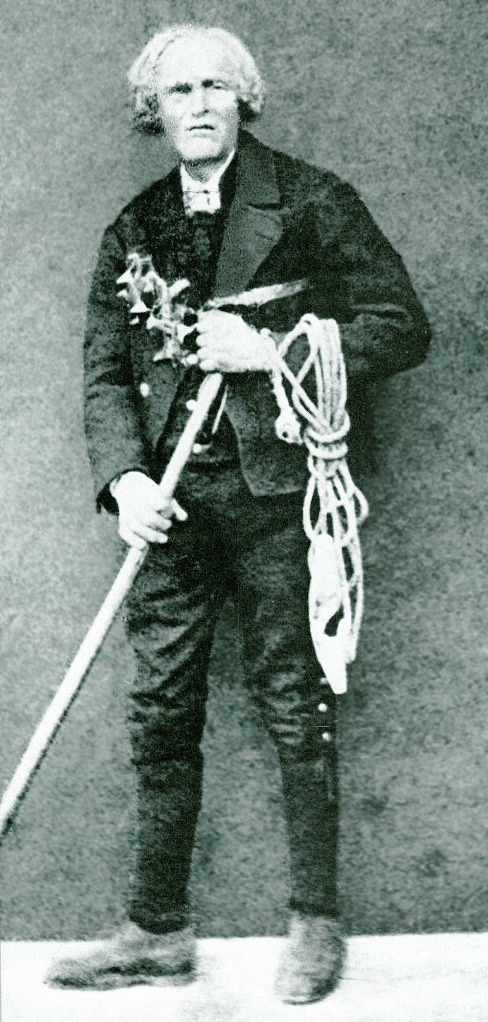 Bergführer Francesco Lacedelli alias Chéco da Melères (1796–1886)